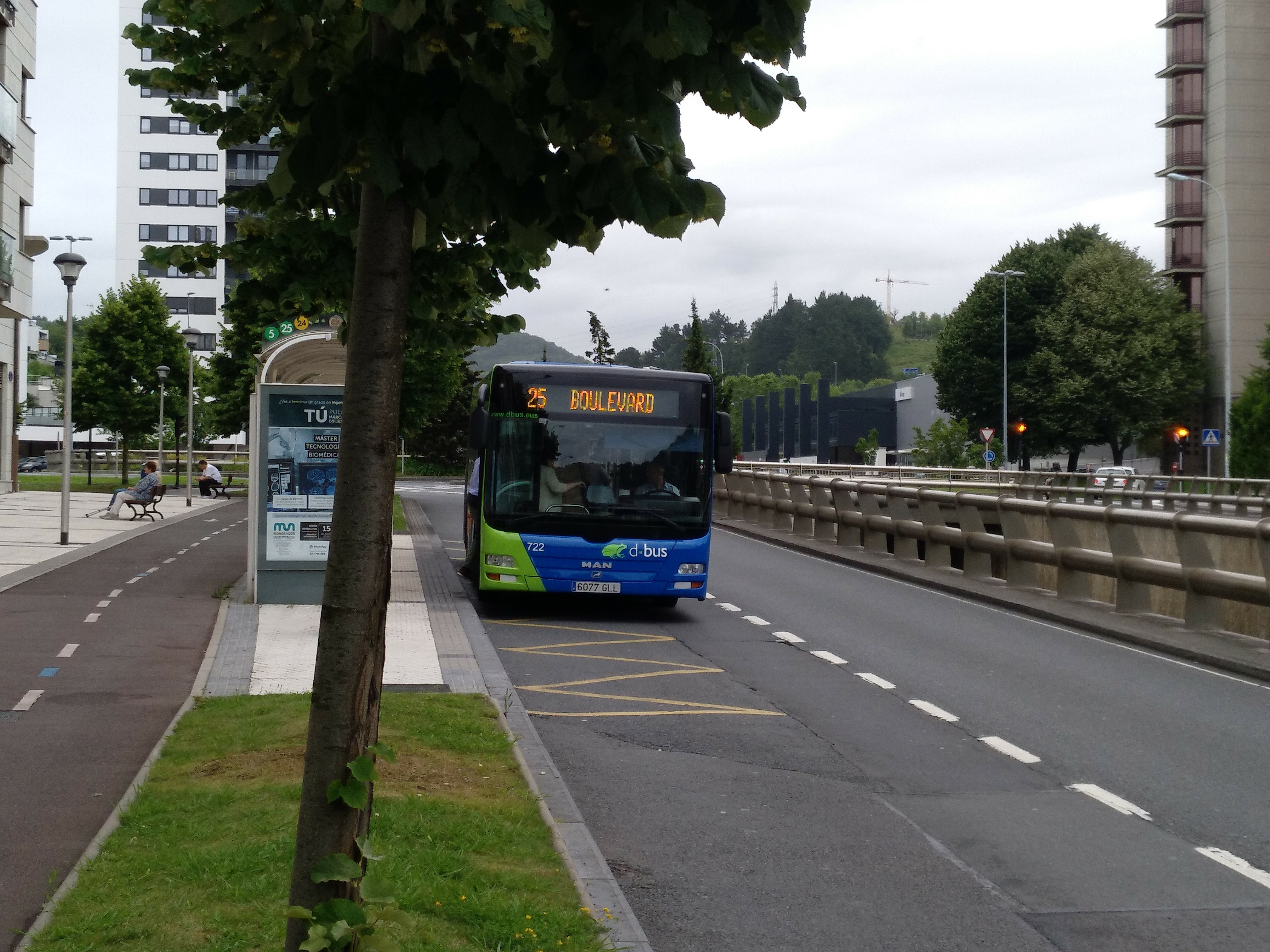 Autobus urbano de d·bus de la línea 25 en la Plaza América en San Sebastián